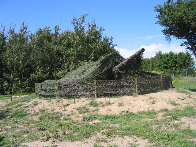 Stevnsfortet, 15 cm. lyskanon